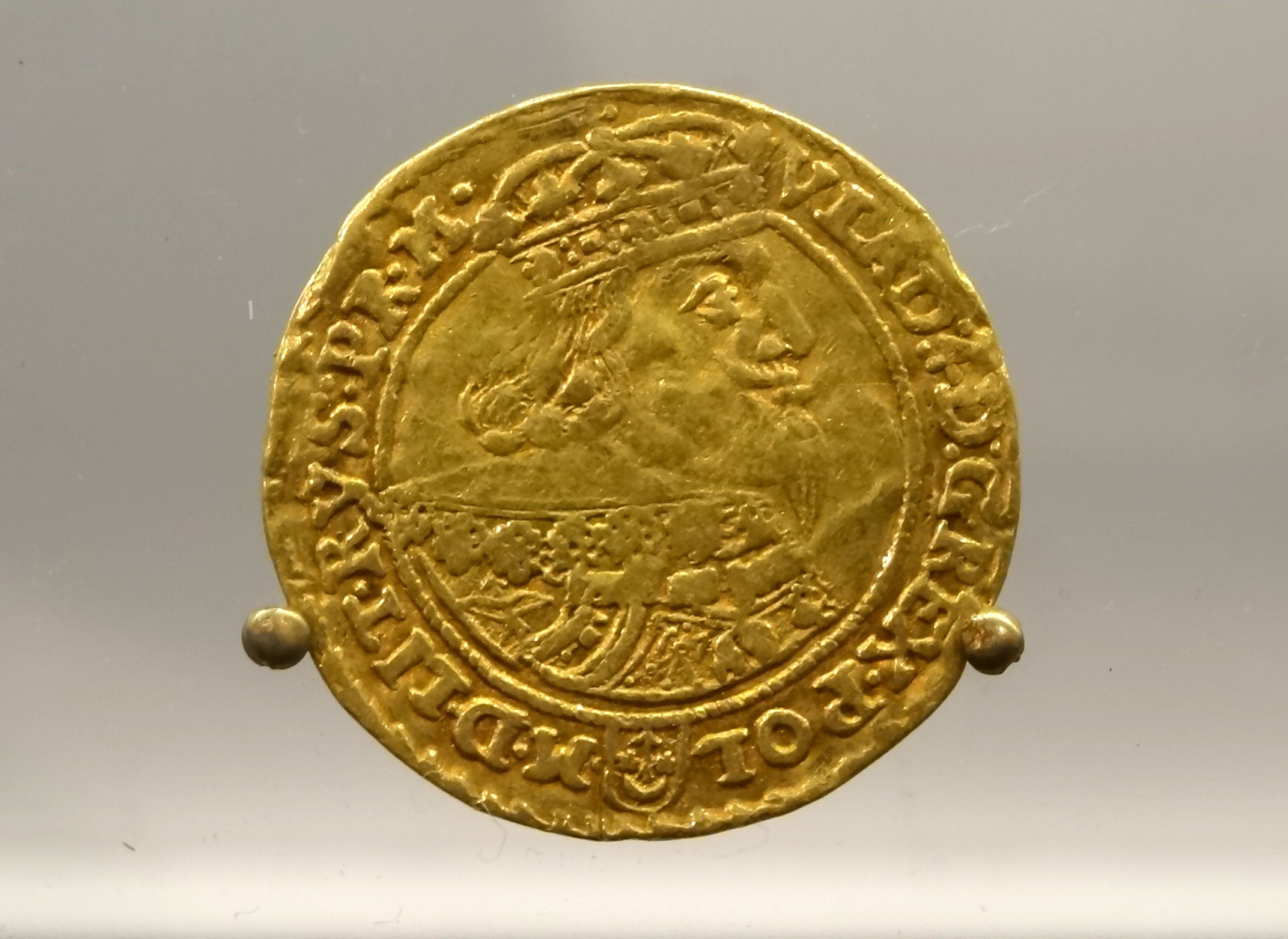 Wystawa starych monet polskich, niektórych wybijanych w mennicy bydgoskiej z XVII w. w Europejskim Centrum Pieniądza Muzeum Okręgowego im. Leona Wyczółkowskiego na Wyspie Młyńskiej w Bydgoszczy